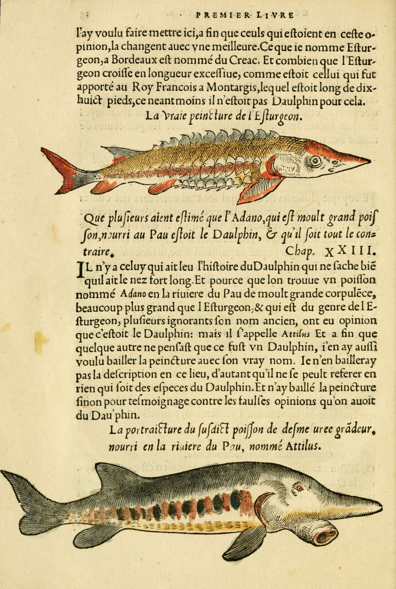 p REMI E R Livre Tay voulu faire mettre ici,a fin que ceuls qui eftoien t en cefte o- pinion,Ia changent auec vne meilIeure.Ceque ie nomme Eftur- geon^a Bordeaux eft nommé du Creac. Etcombienque TEftur' geon croiffe en longueur exceffiue, comme eftoit cellui qui fut apporté au Roy Francoisa Montargis,lequel eftoit long de dix- huiCl pieds,ce néant moins il n eftoit pas Daulphm pour cela. La'\fYuie j^anihre de lEJlurocon. Que j^lujleurs aient eflimé que ïkâano.qui ejl moult ^randpoif fon,urri au Pau ejïoit le Daul^hin^ Cr qutl fait tout le con» traire^ Chap. X ^ 1 1 1. TL nyaceluyquiaitleu FhiftoireduDauIphin qui ne fâche bic quilaitle nez fort long. Et pource que Ion trouue vn poiflbn nommé Adano en la riuiere du Pau de moult grande corpuléce, beaucoup plus grand que 1 Efturgeon;&: qui eft du genre del £- fturgeonjplufieurs ignorants le n nom ancien, ont eu opinion quec'eftoit leDauIphin: mais il l'appelle Attitns Et a fin que quelque autre ne penfaft que ce fuft vn Daulphin, ienay auiïî voulu bailler la peincflure auec fon vray nom. lenenbailleray pas la defcription en ce lieu, d'autant qu'il ne fe peult référer en rien qui ioitdes efpecesdu Daulphin.Etnay baillé lapeincT:ure finon pour tefmoignage contre les faulfcs opinions qu'on auoit du Dauphin. LavortraiBuredu fufdi^ voijjon de defme ureecradcur^ nourri en la riuiere du P^w, nommé Attilus»